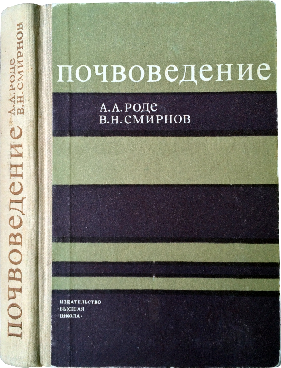 Роде А. А., Смирнов В. Н. Почвоведение. 2-е изд., испр. и доп. М.: Высшая школа, 1972. 480 с.